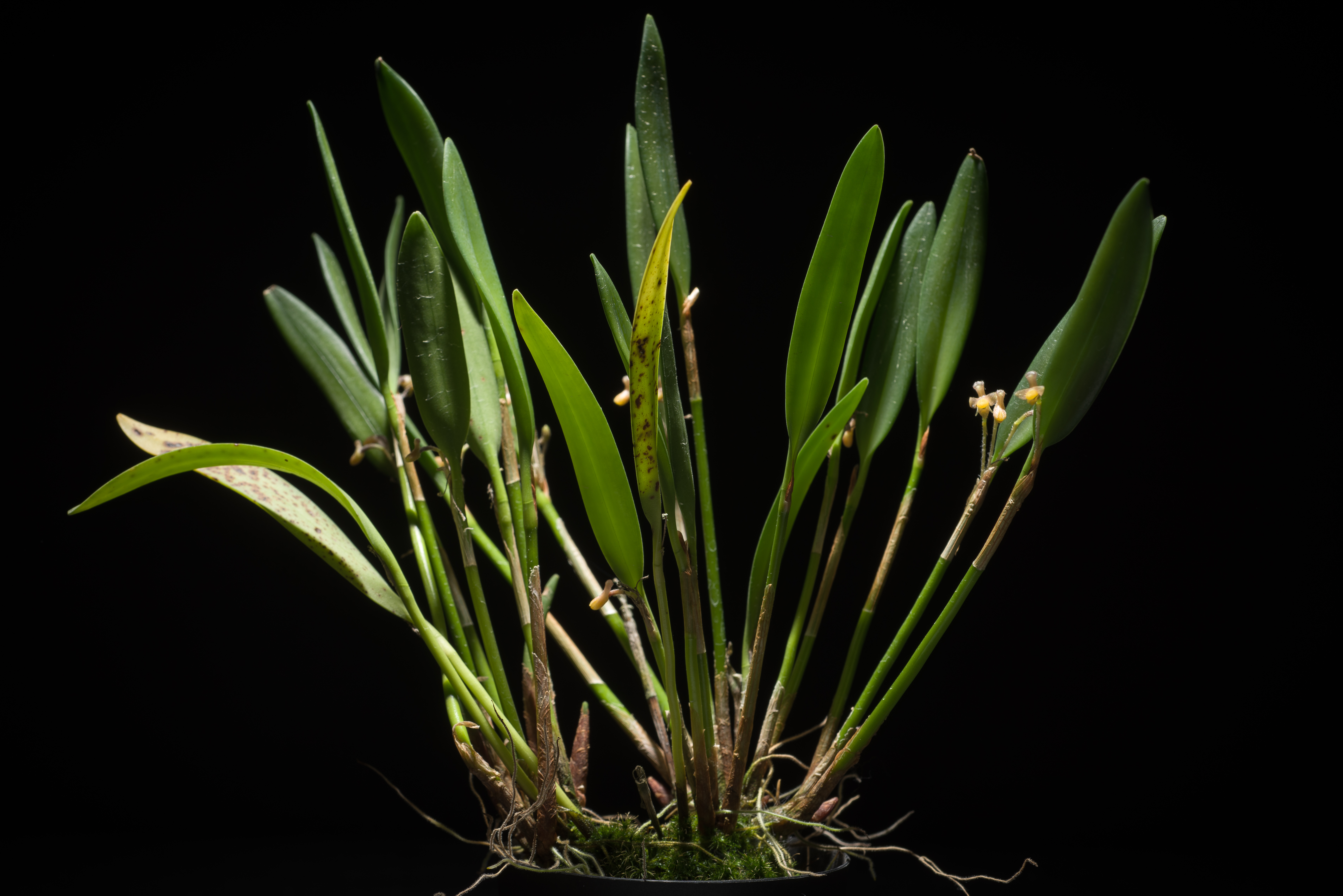 Ceratostylis backeri - (Java, Indonesia)